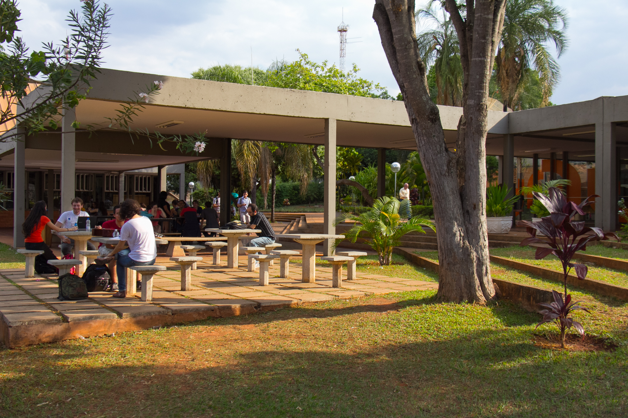 Foto: Isa Lima